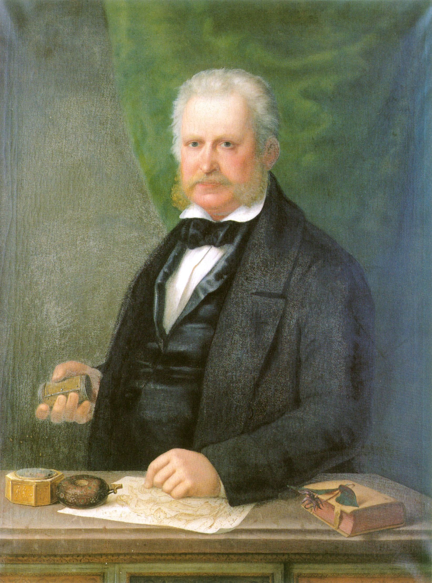 Self-portrait